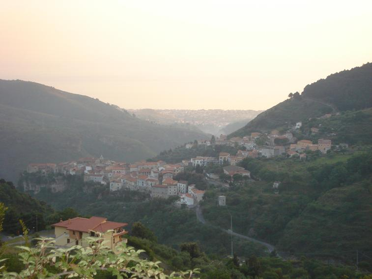 Tortora, centro storico.